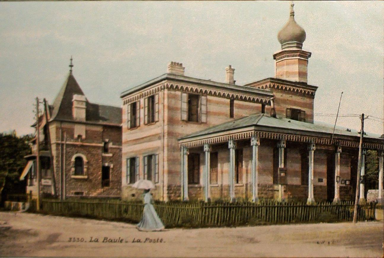 carte postale de La Baule avec une vue de la Poste prise dans les années 20